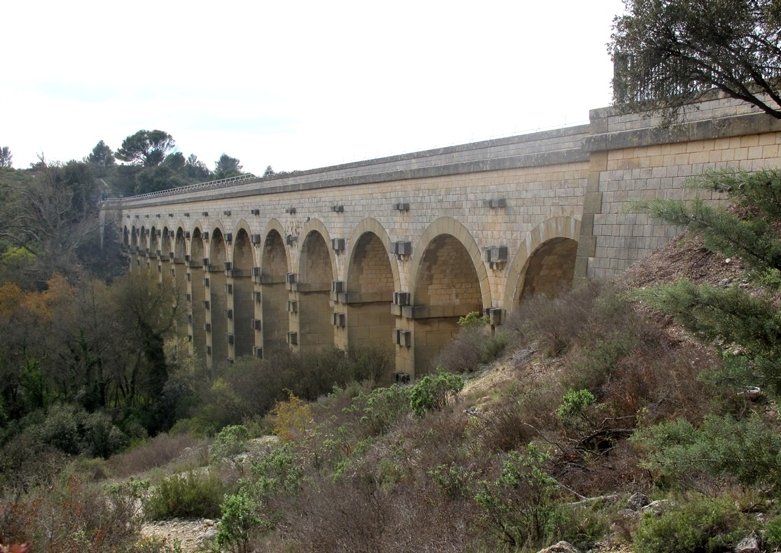 L'aqueduc vu de la rive droite, côté amont